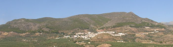 Cabra del Santo Cristo en la ladera de Sierra Cruzada